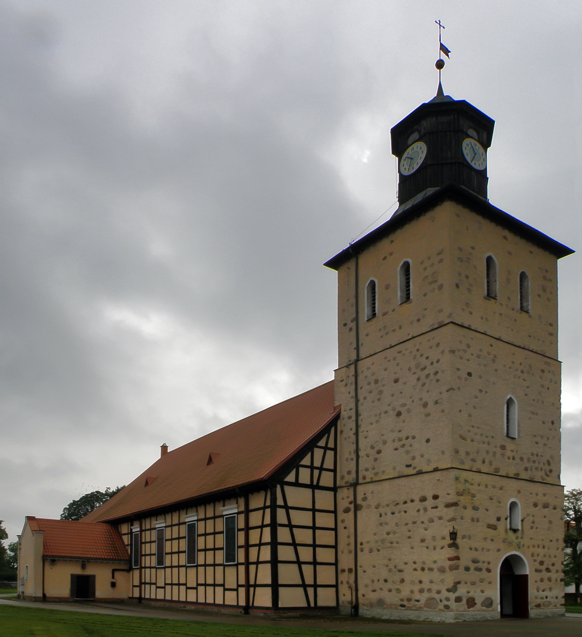 Polska, Pisz - Rzymskokatolicki Kościół Parafialny św. Jana Chrzciciela. Zabytek wpisany pod nr A-472 do rejestru zabytków województwa warmińsko-mazurskiego. This photo of Warmian-Masurian Voivodeship was taken during Wikiexpedition 2012 set up by Wikimedia Polska Association.You can see all photographs in category Wikiekspedycja 2012. The making of this document was supported by Wikimedia Polska.